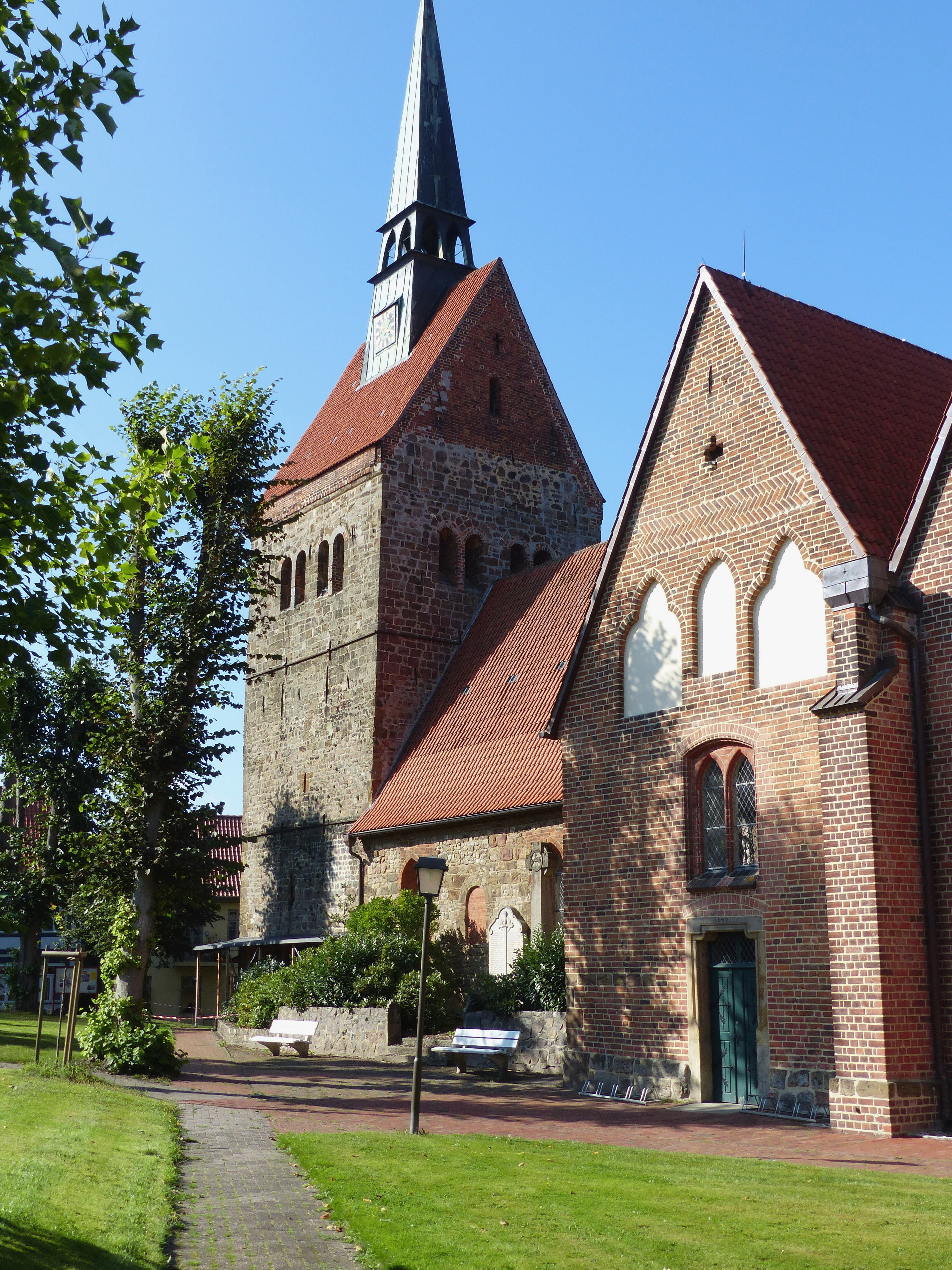 St Cyriakus-Kirche in Vilsen: Turm und backsteingotisches Südquerschiff